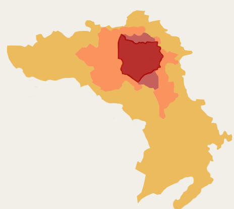 Parte 3